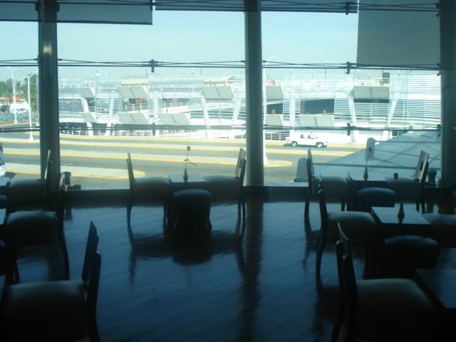 Terminal 1 del Aeropuerto